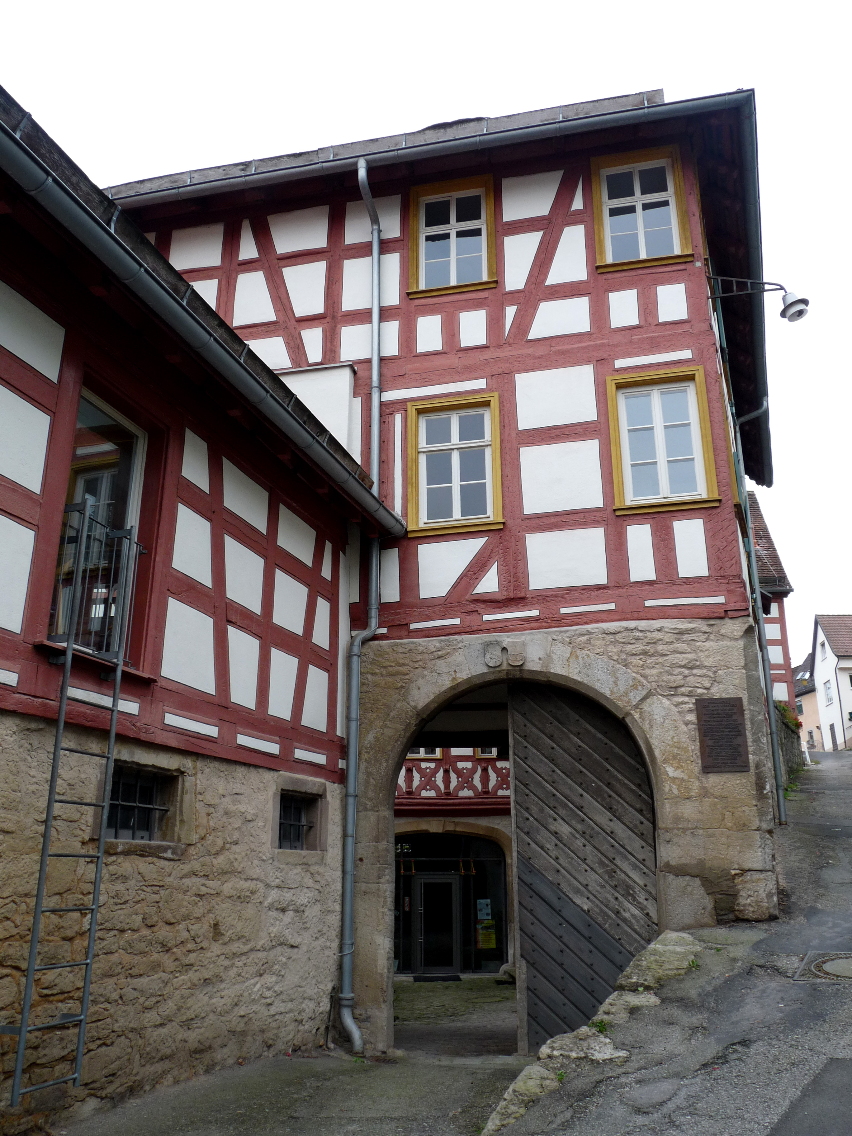 Creglingen (Bade-Wurtemberg, Allemagne). Romschlössle ou Haus Weinsberg. Maison natale du peintre Alexander Macco (plaque)